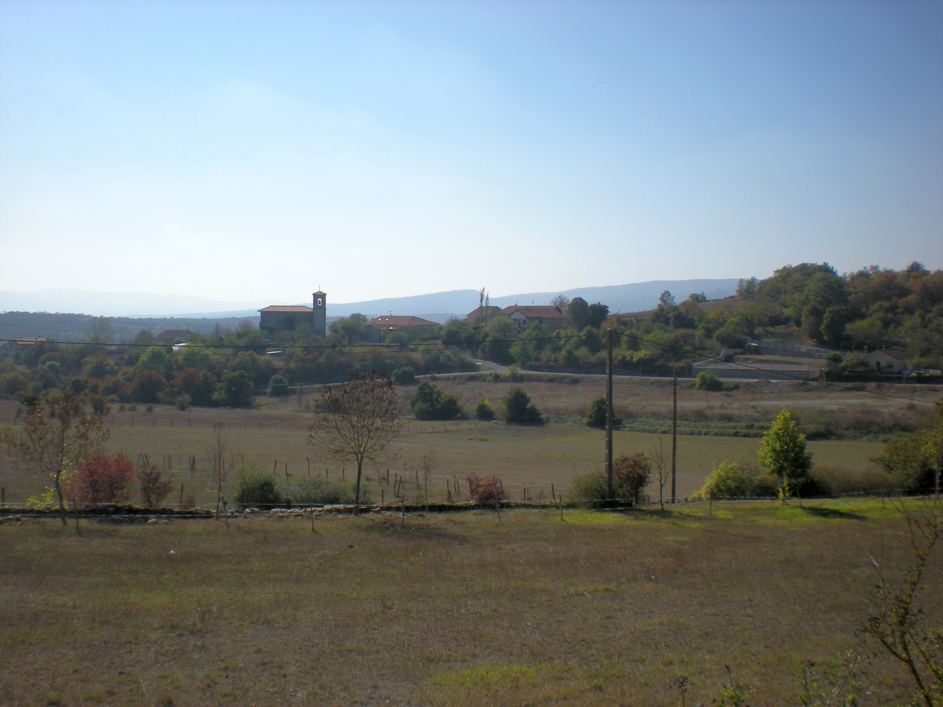 Akosta, Zestafetik —ekialde hego-ekialdetik— ikusia. Zigoitia, Araba.